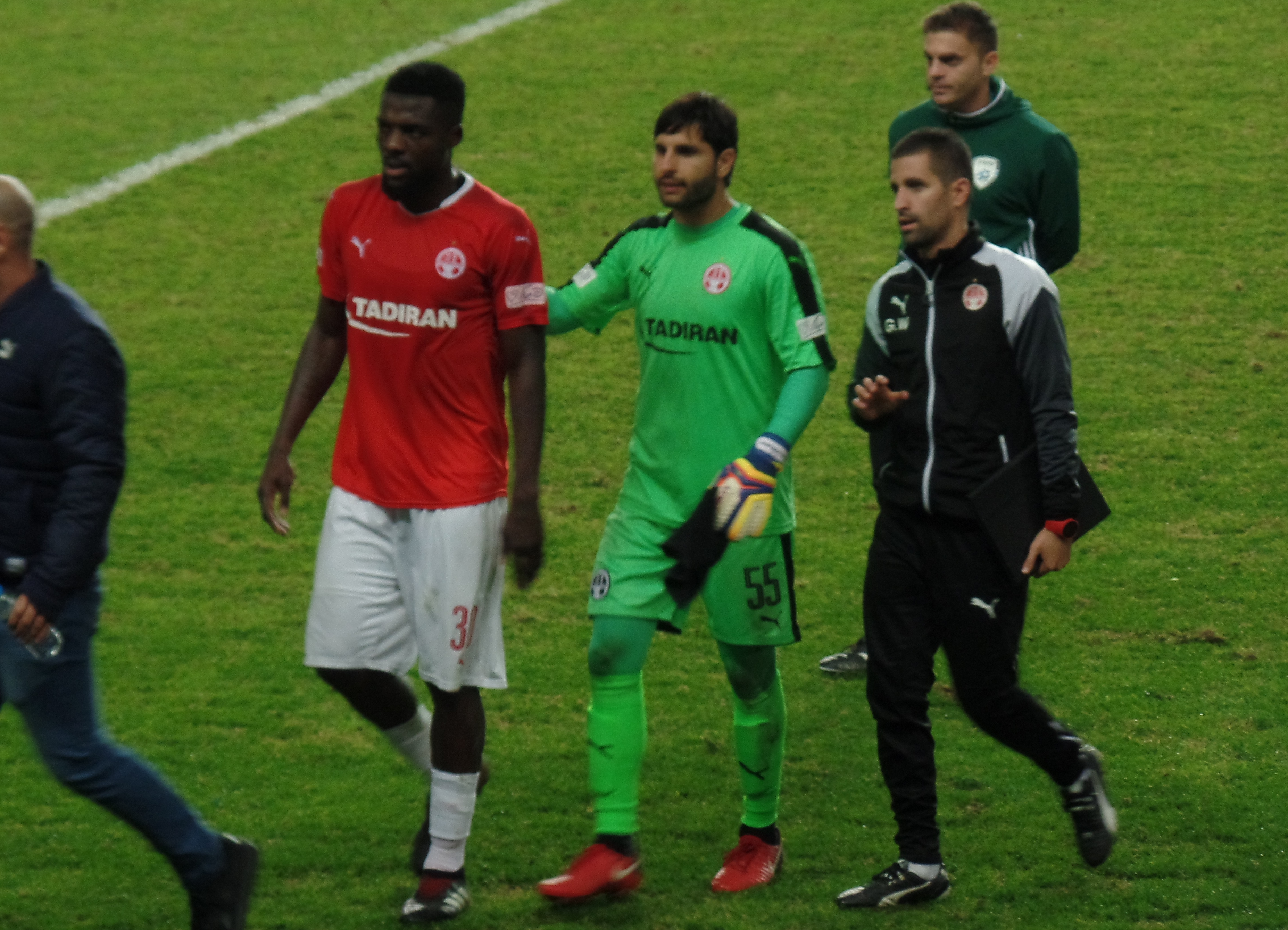 ג'ון הוגו והשוער גיא חיימוב במדי הפועל באר שבע